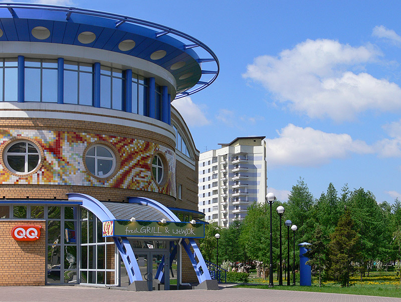 QQ Restaurant